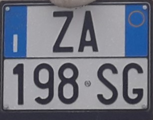 Targa quadrata ZA; Italian license plate. Image taken from a personal photo